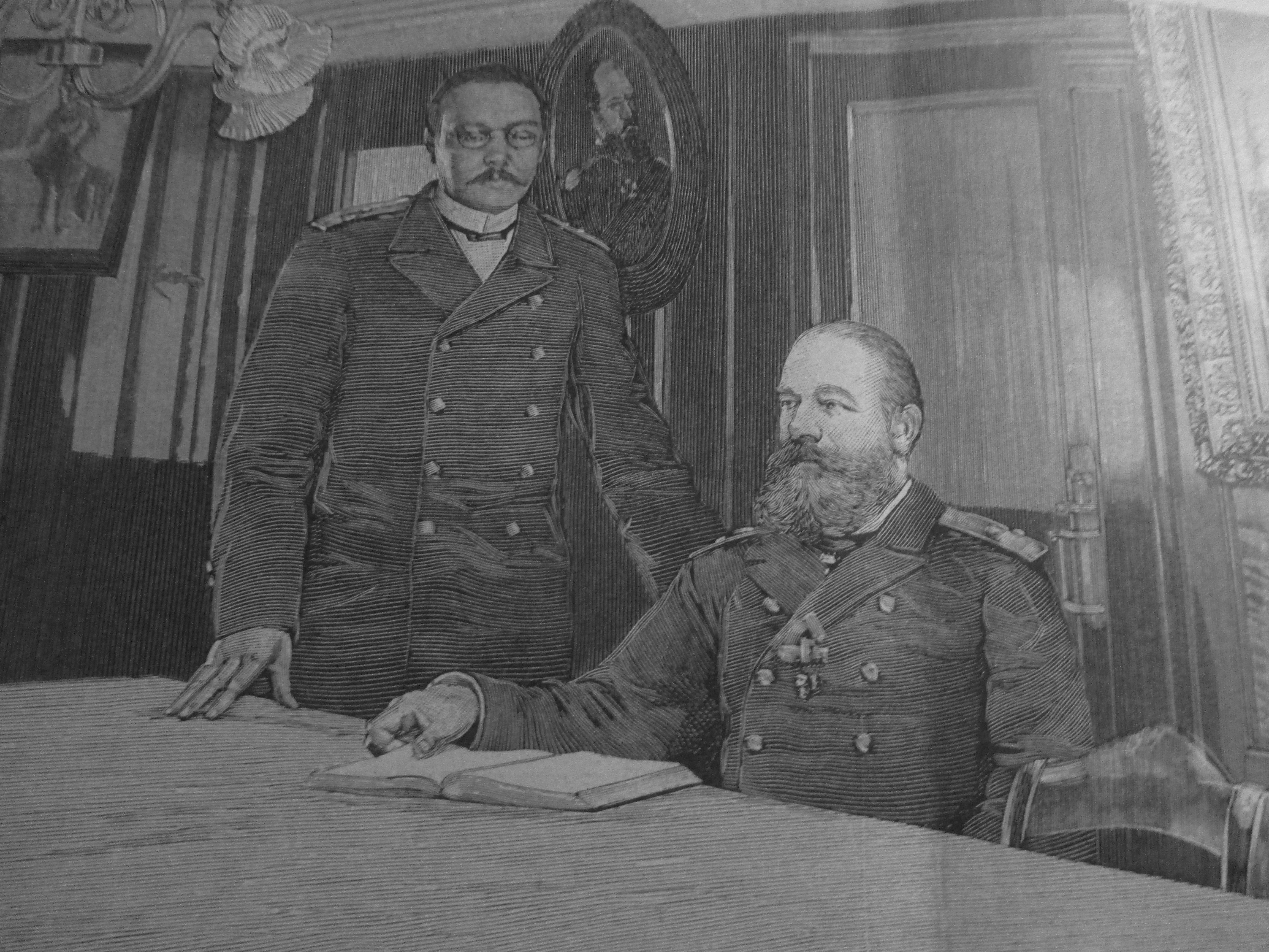 Le salon de l'amiral Avelan à bord du Pamiat Azowa: l'amiral et son aide de camp, le comte Nicolas Tolstoï, au cours de la visite de la flotte russe à la flotte française à Toulon en octobre 1893 dans le cadre de l'Alliance franco-russe; in L'Illustration, n° 2642, 14 octobre 1893.